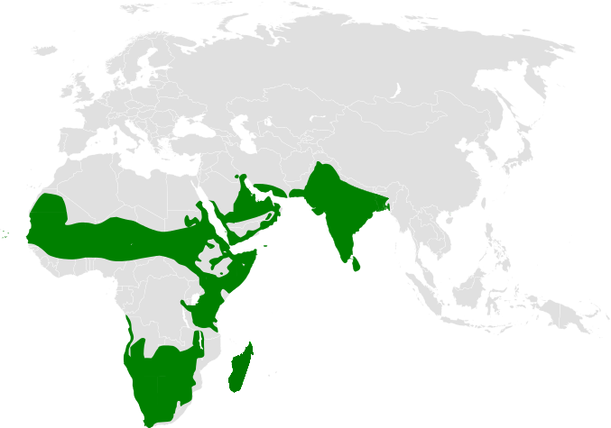 Eremopterix distribution map